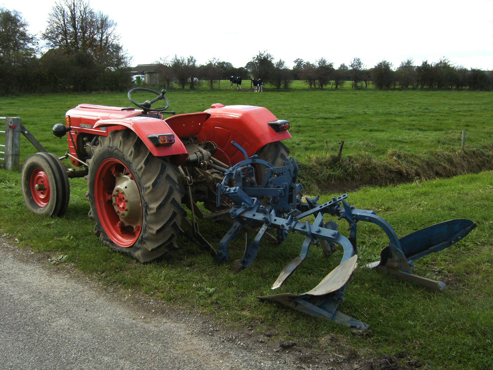 Oldtimer tractor en keerploeg uit ca 1960, Olsterklei